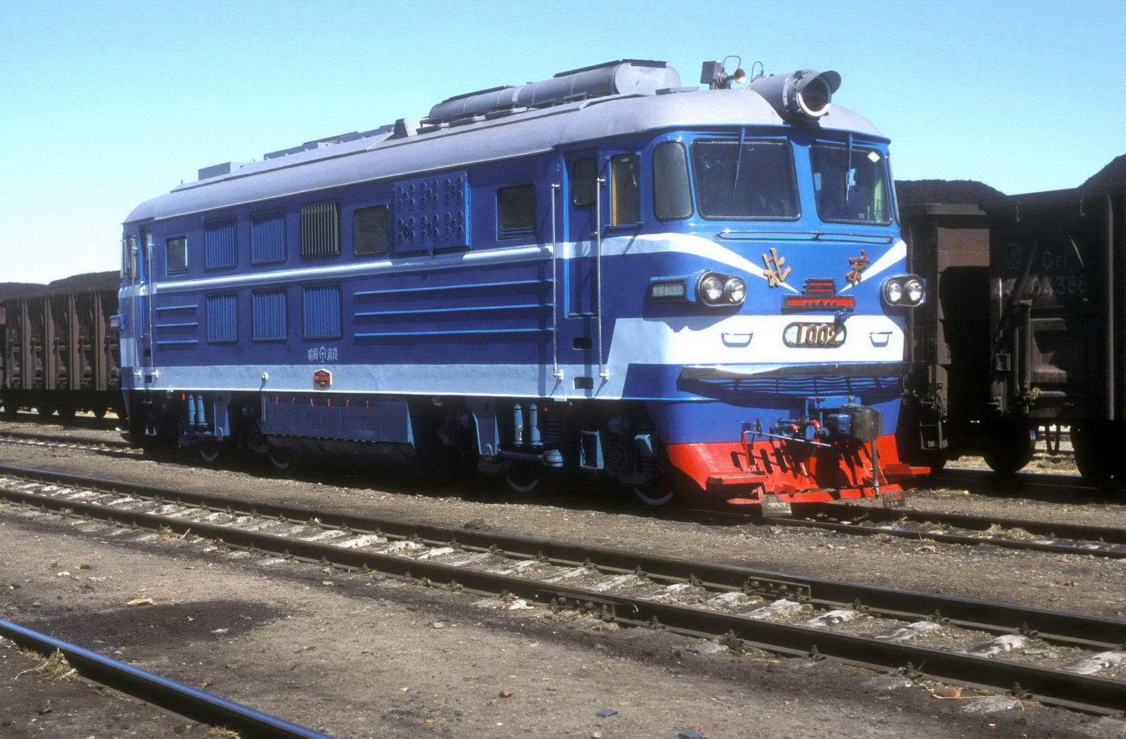 中文（中国大陆）: 北京型1002号机车在满洲里